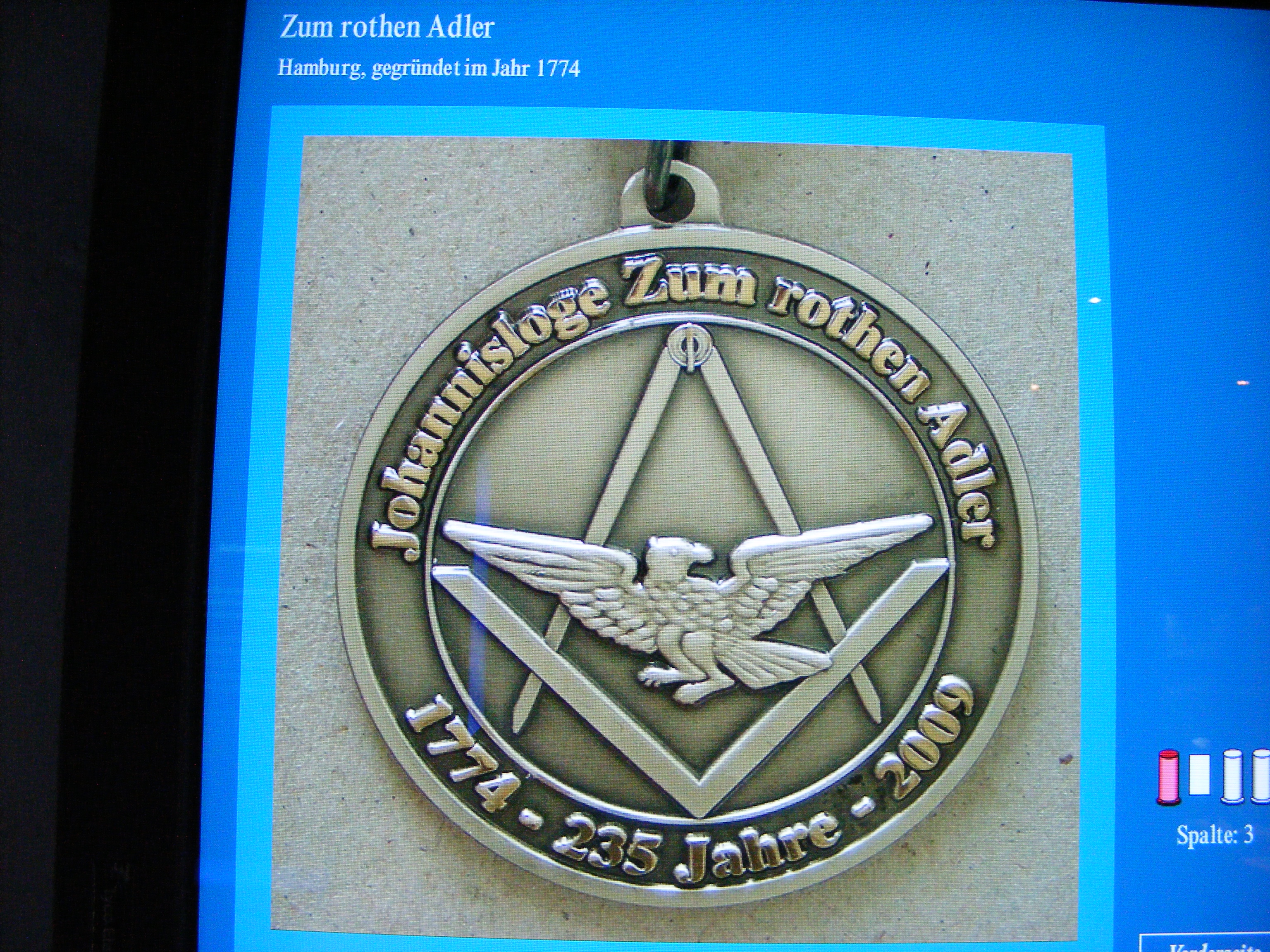 Bayreuth, Deutsches Freimaurermuseum: Bijou der "Johannesloge Zum rothen Adler" (Hamburg)